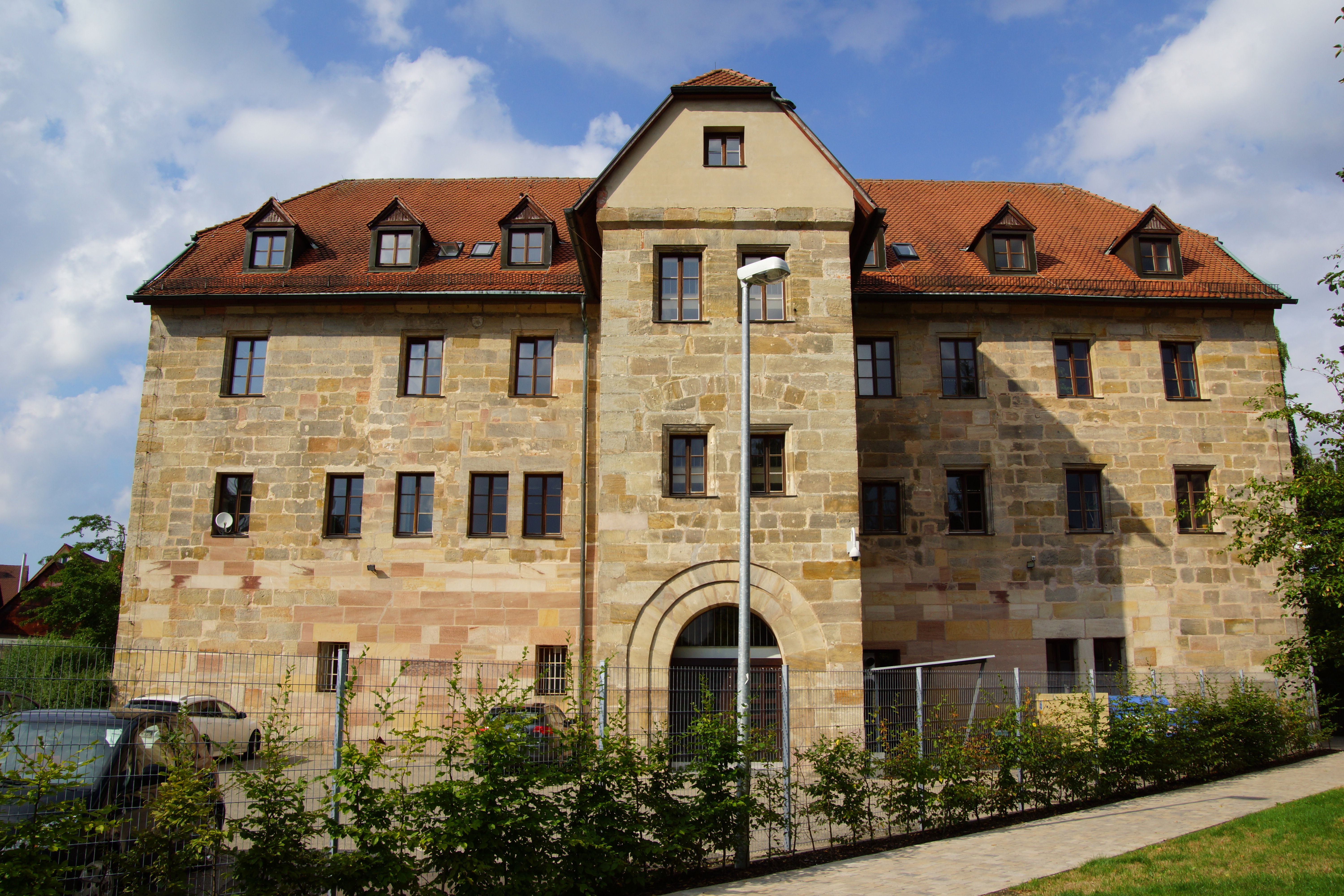 Das ehemalige Nürnbergische Pflegschloss zu Altdorf beherbergt gegenwärtig eine Polizeistation